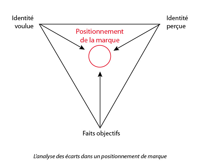 Schéma